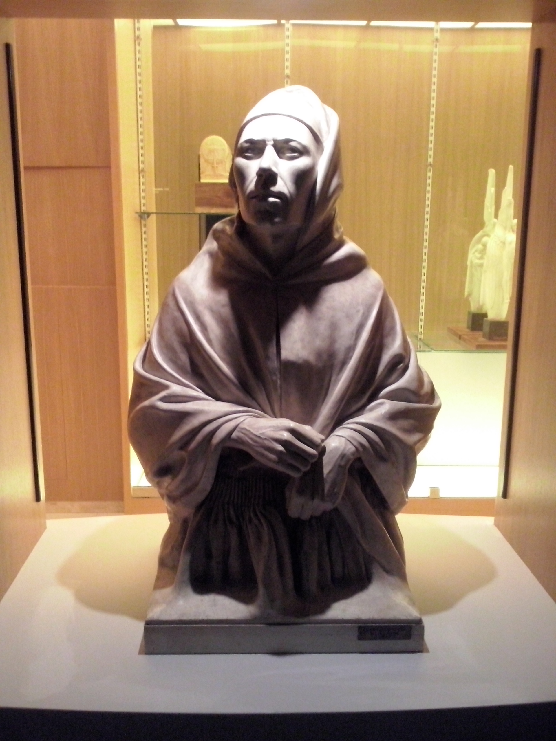 Sardu: Istàtua de s'iscultore Francesco Ciusa fata in su 1908-1909, esposta in sa Biennale de Venètzia in su 1909 e como in su Museu Ciusa de Nùgoro. Rapresentat un'òmine de Orane, chi bendiat e acontzaiat iscarpas biagende in totu sas biddas de Sardigna.